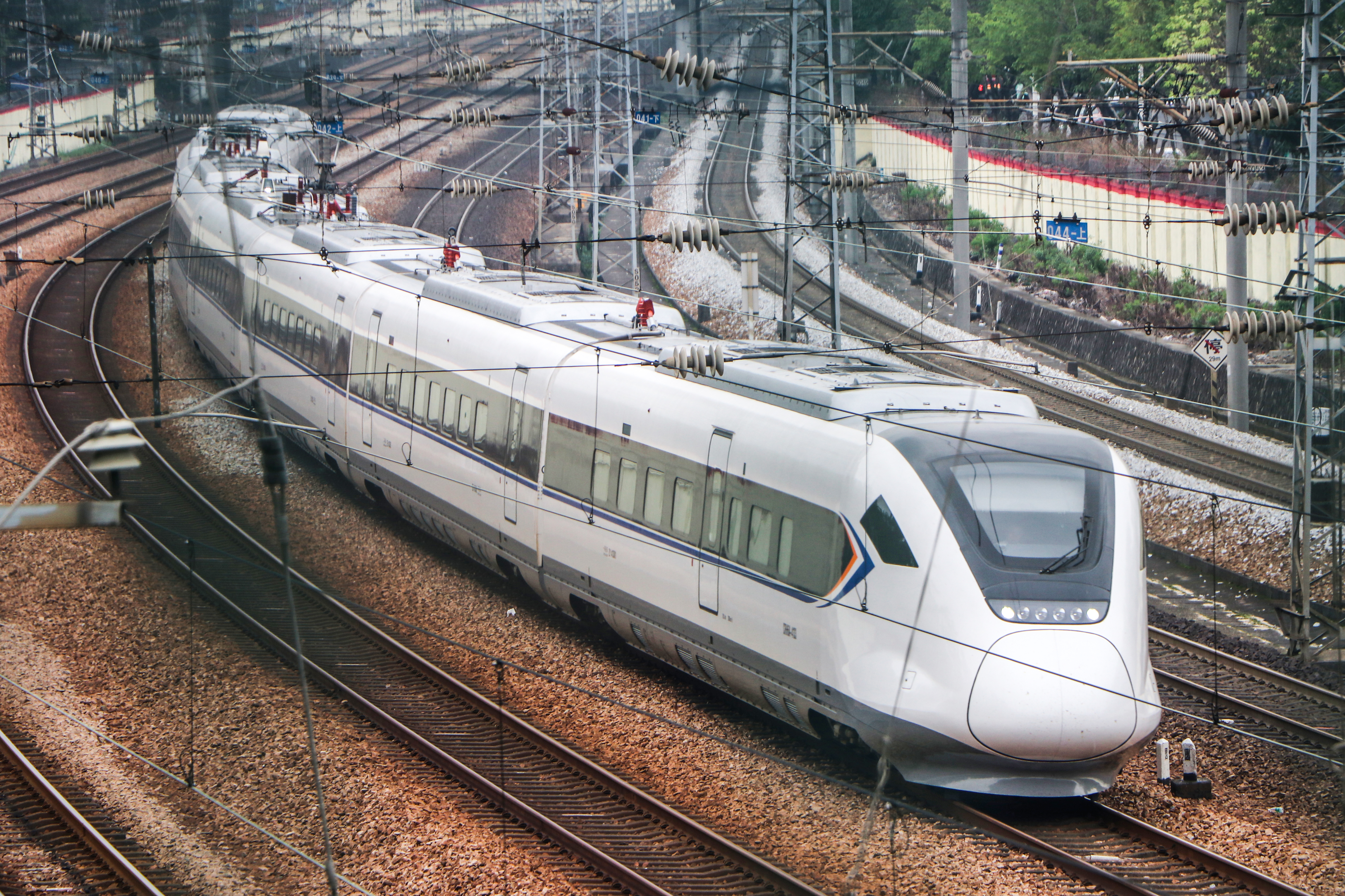 CRH6A广深定制版